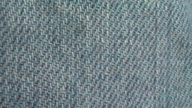 Jeansstoff einer Jeanshose wo die Struktur gut erkennbar ist.